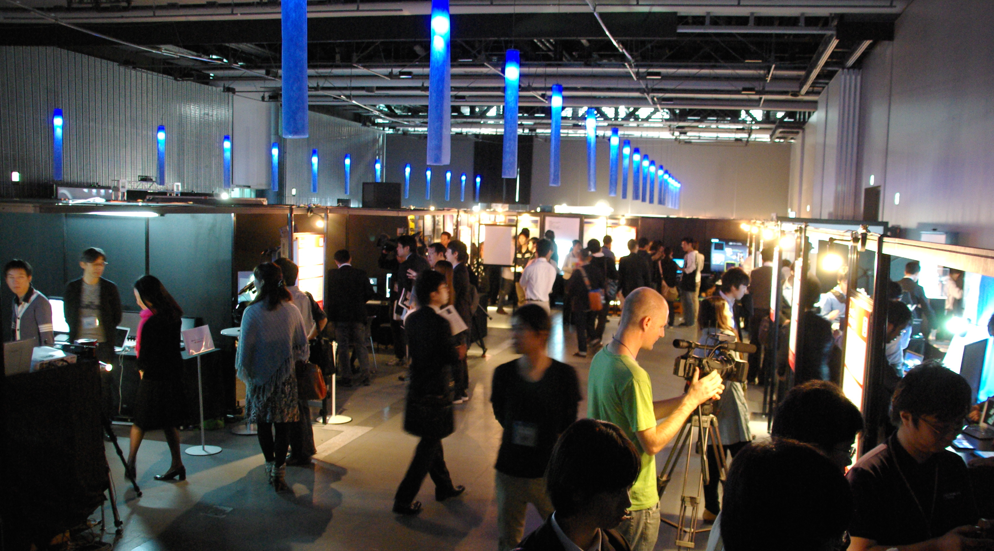 DIGITAL CONTENT EXPO 2012